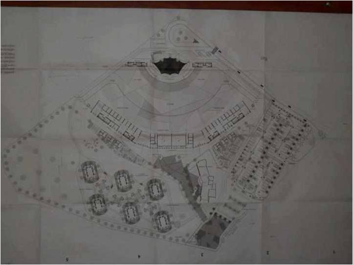 Plano del futuro parque cuna de Acordeones de Villanueva, donde en los proximos años se realizará el festival